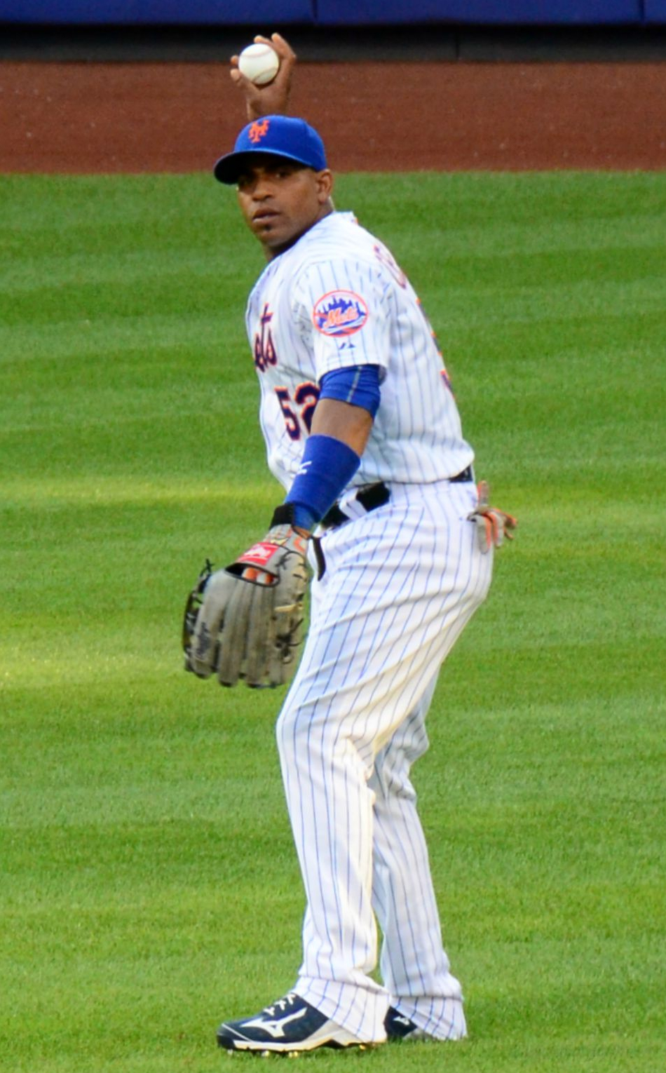 Yoenis Céspedes